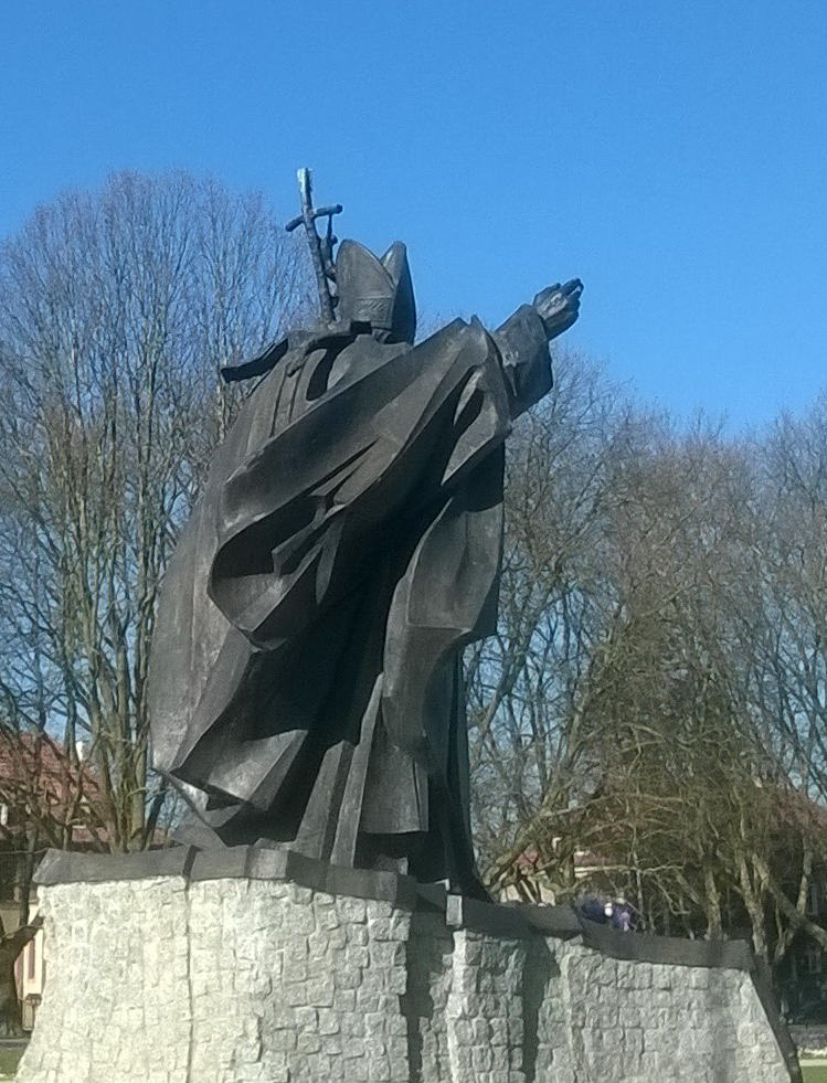 Pomnik Jana Pawła II na Jasnych Błoniach (Szczecin)